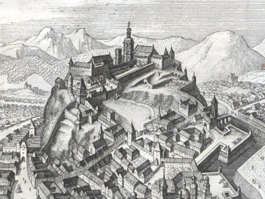 Topographia Provinciarum Austriacarum, Austriae, Styriae, Carinthiae, Carniolae, Tyrolis etc.